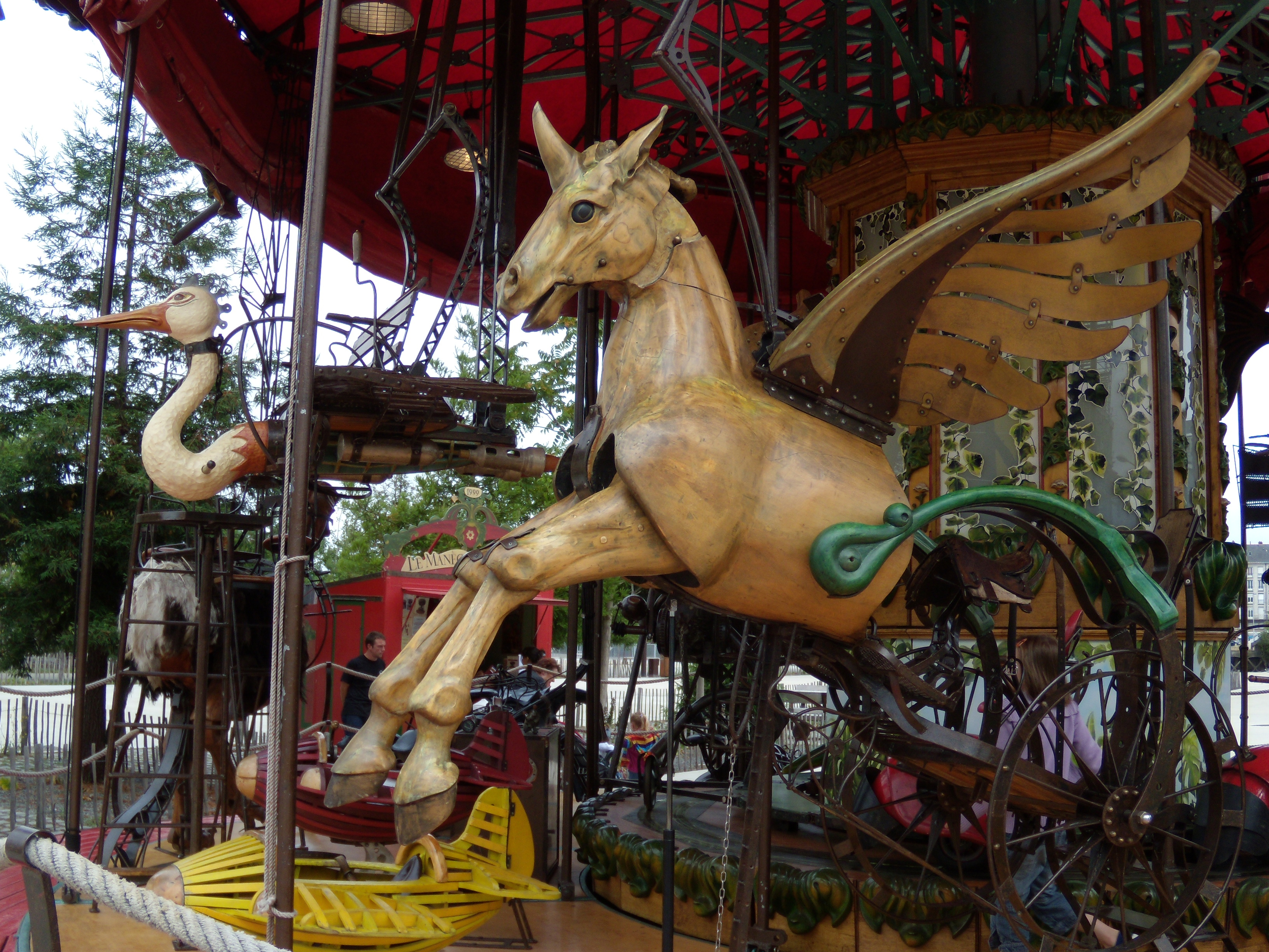 Détail du Manège d'Andréa, Nantes (France)